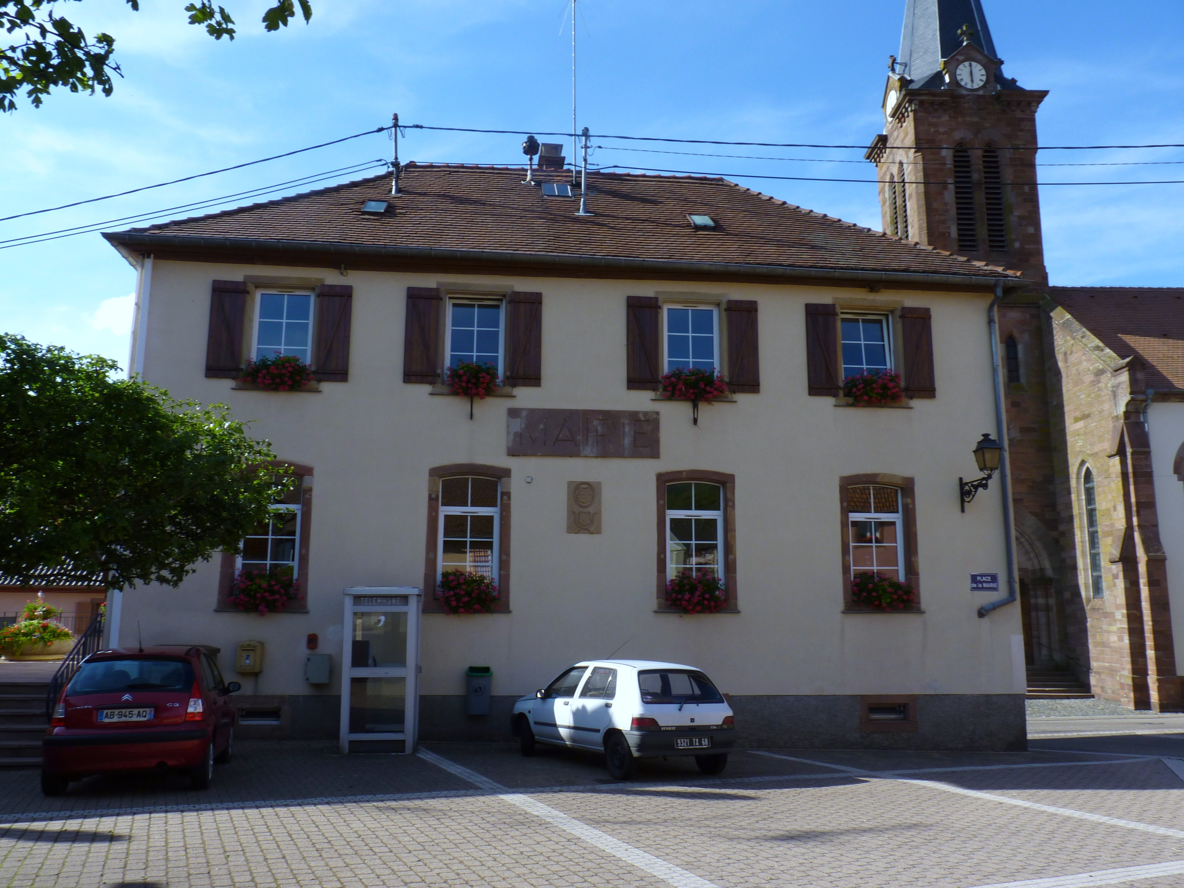 Mairie